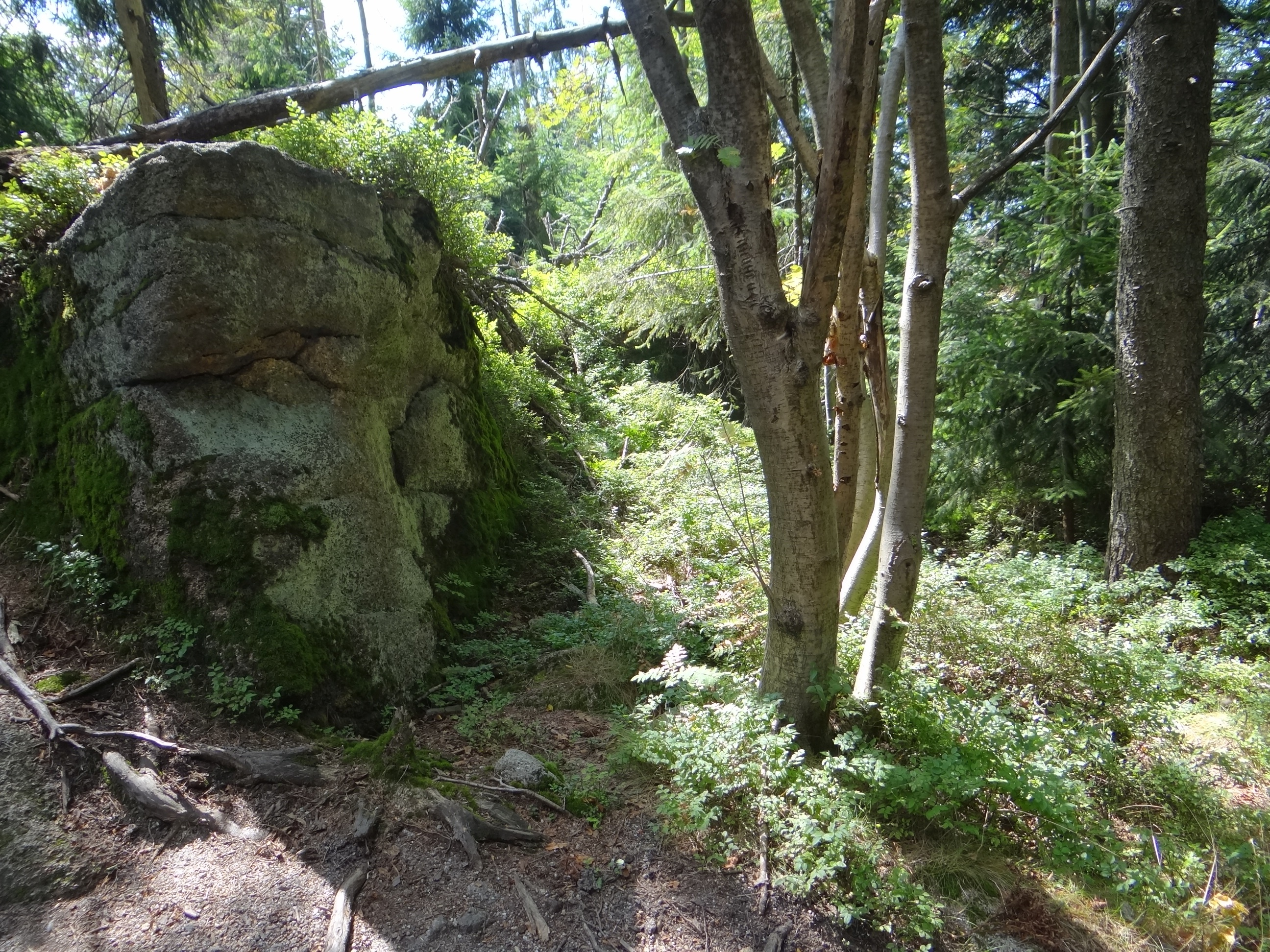 Skałki na Łamanej Skale